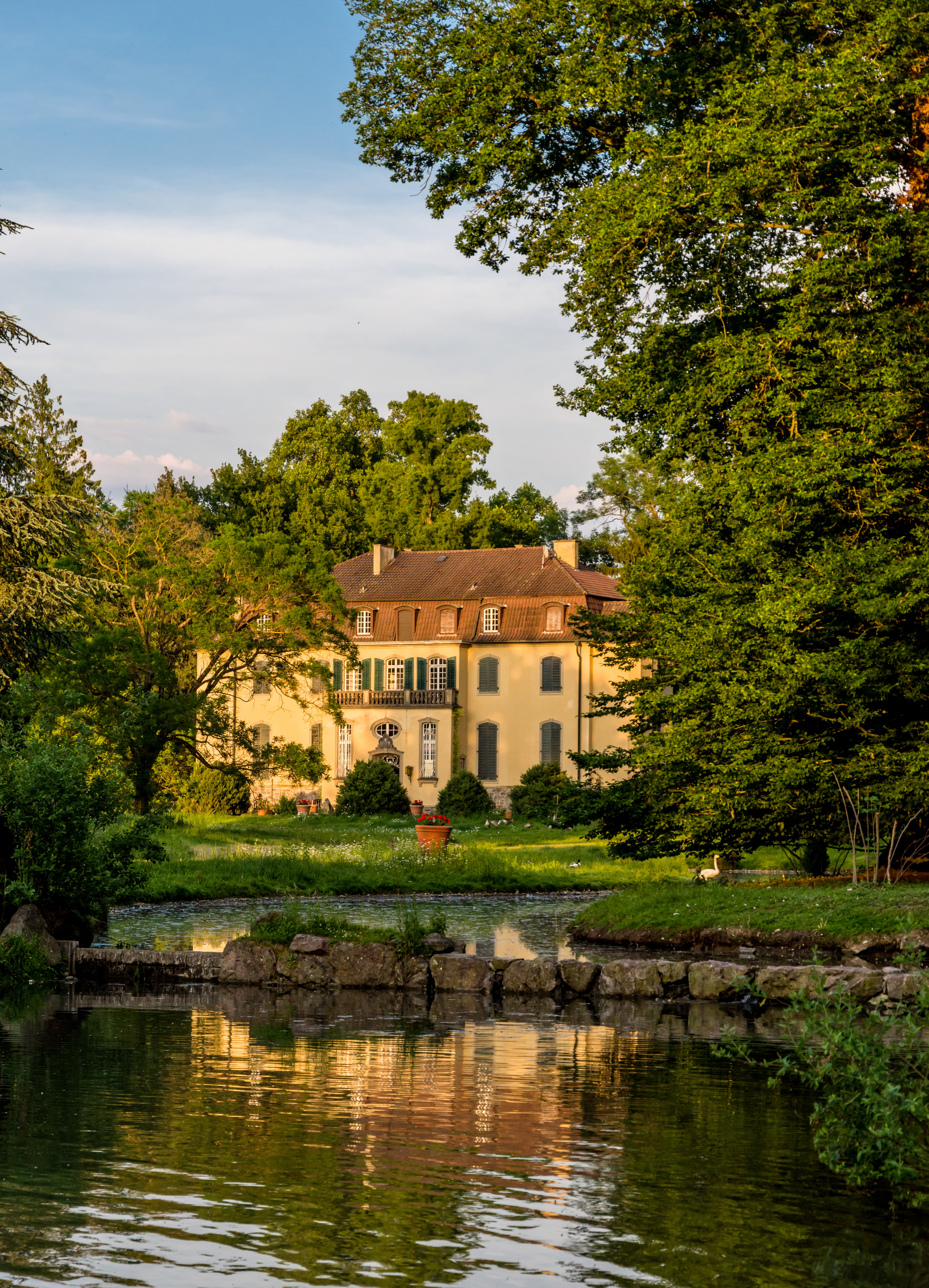 Bilder aus dem Queen-Auguste-Victoria-Park in Umkirch Schlossansichten